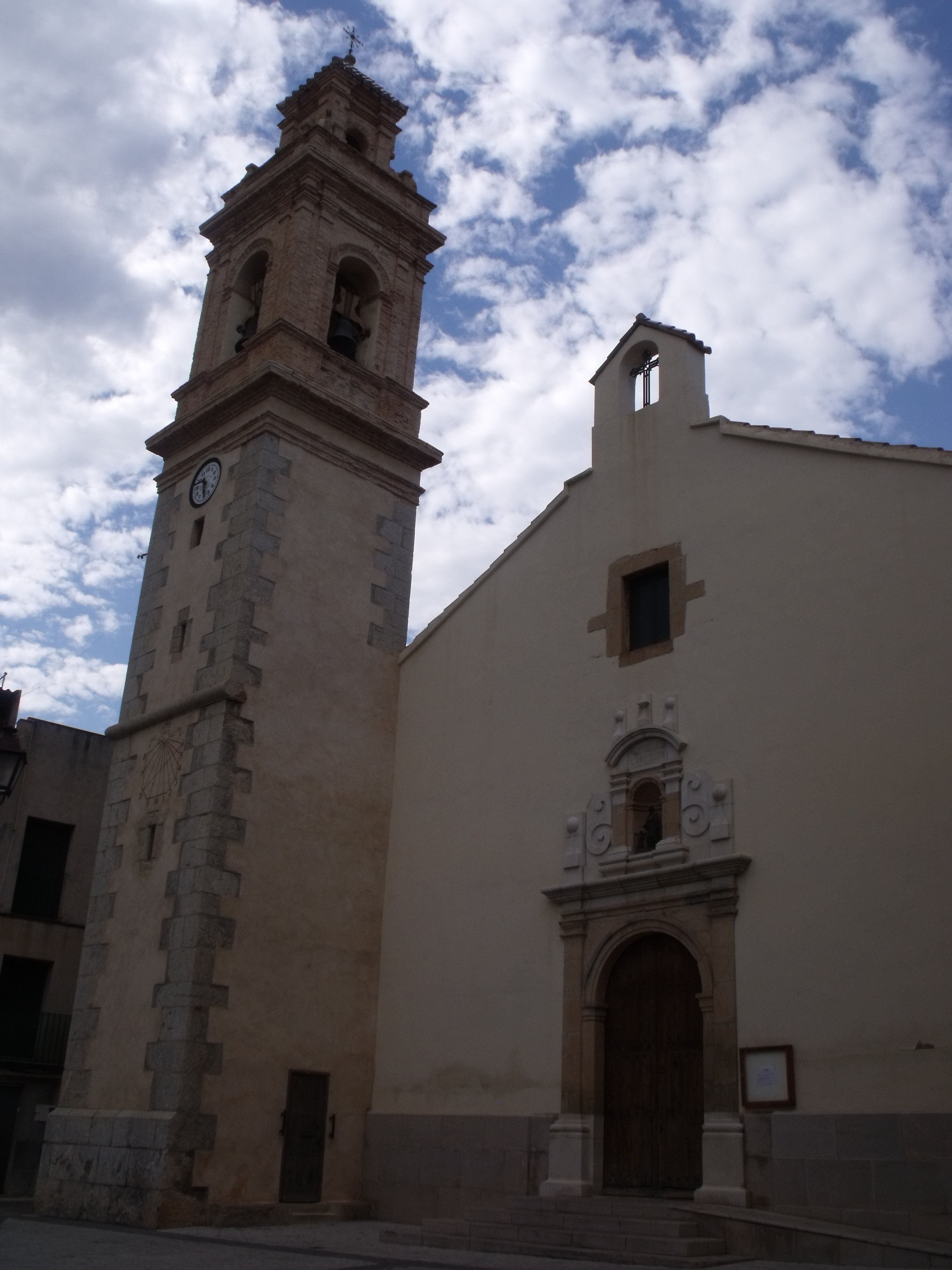 Fachada iglesia de San Mateo